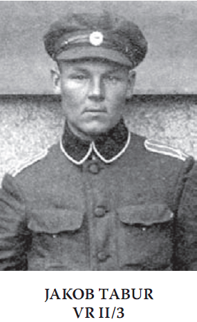 Jakob Tabur